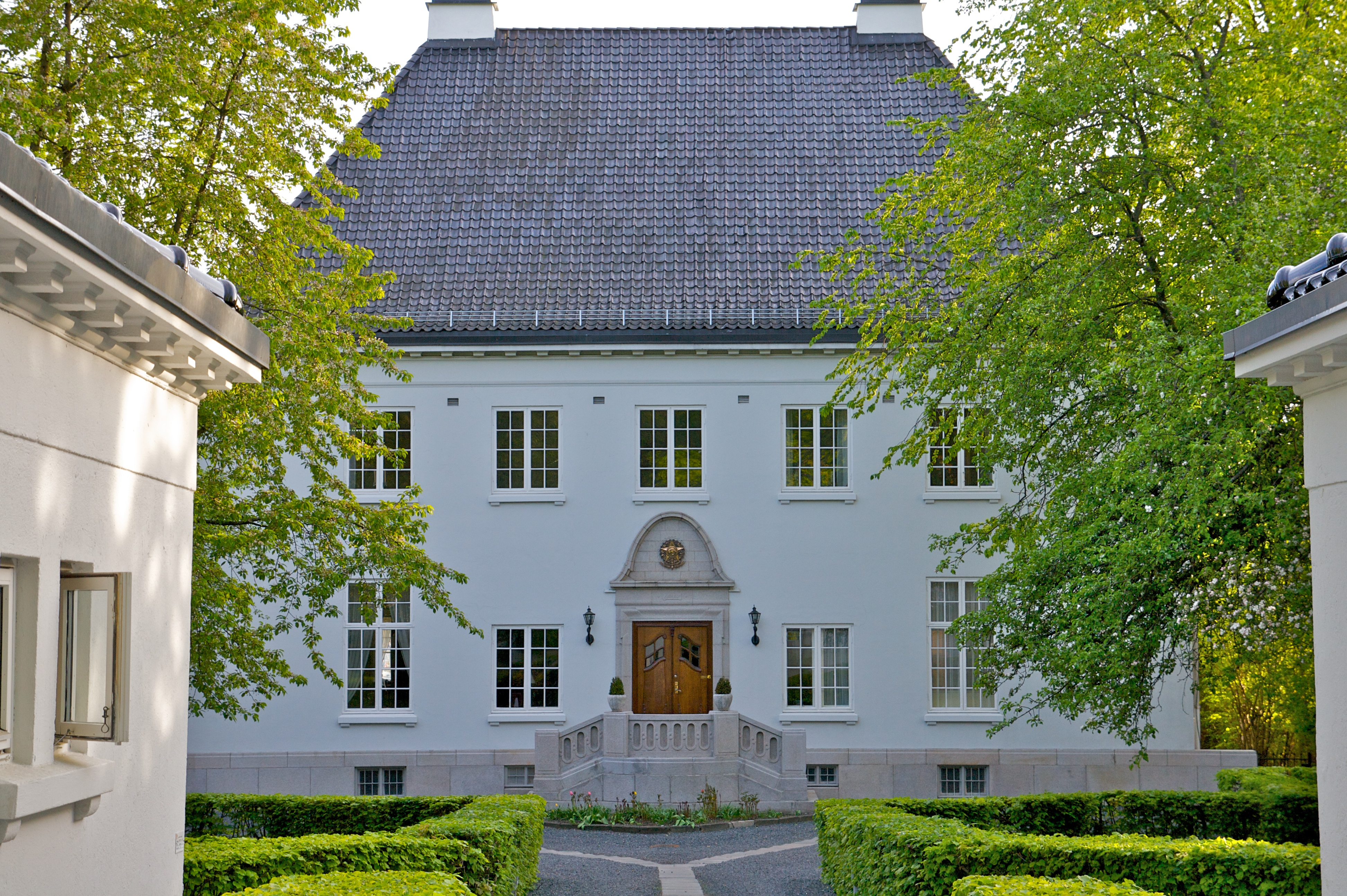 Den brasilianske ambassadørens residens i Oslo. Drammensveien 80d på Skarpsno.